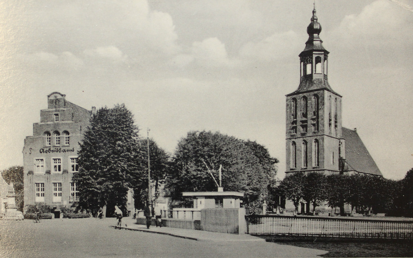 Nordhorn